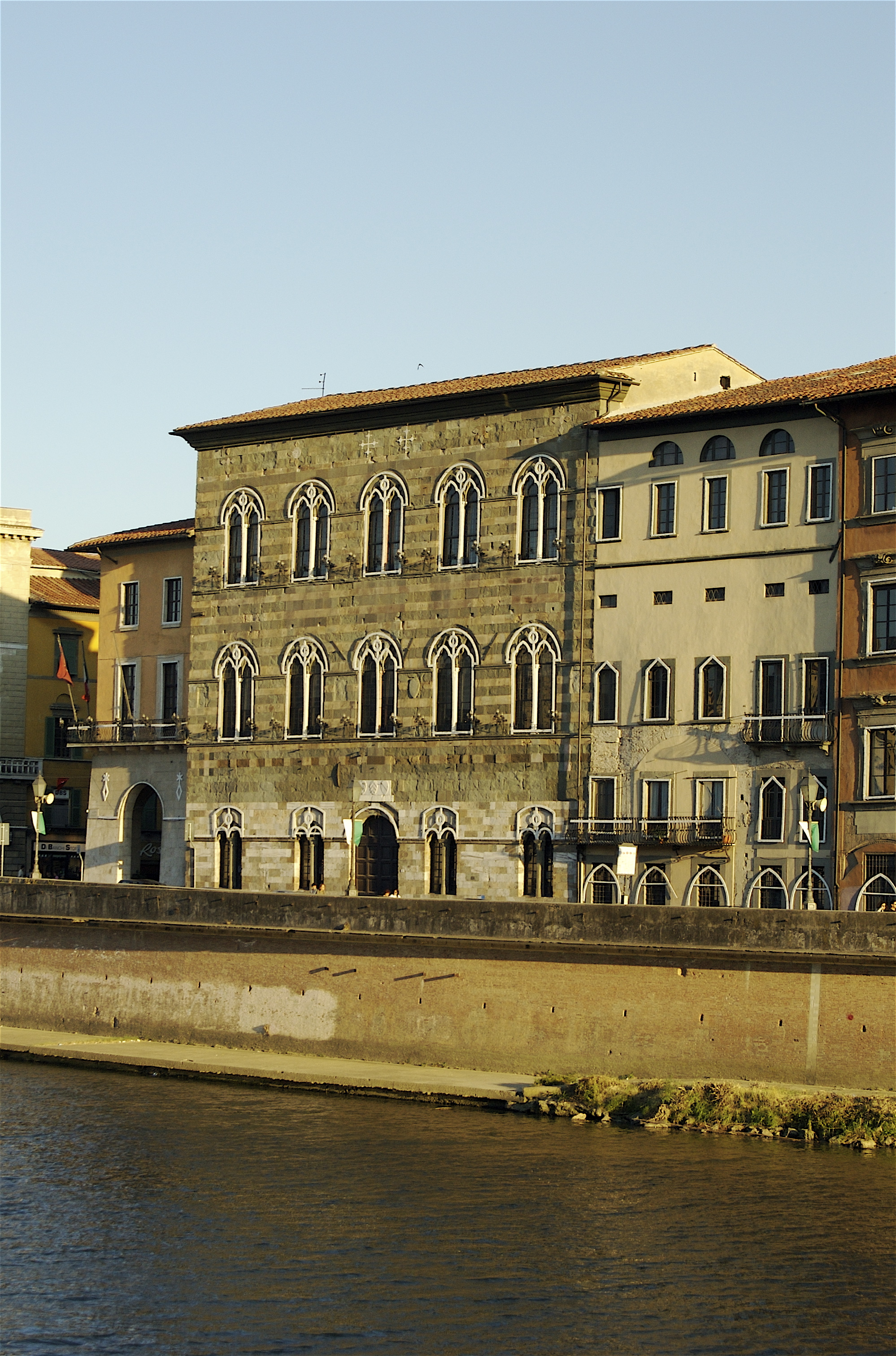 Lungarno a Pisa, Toscana, ItaliaPisa